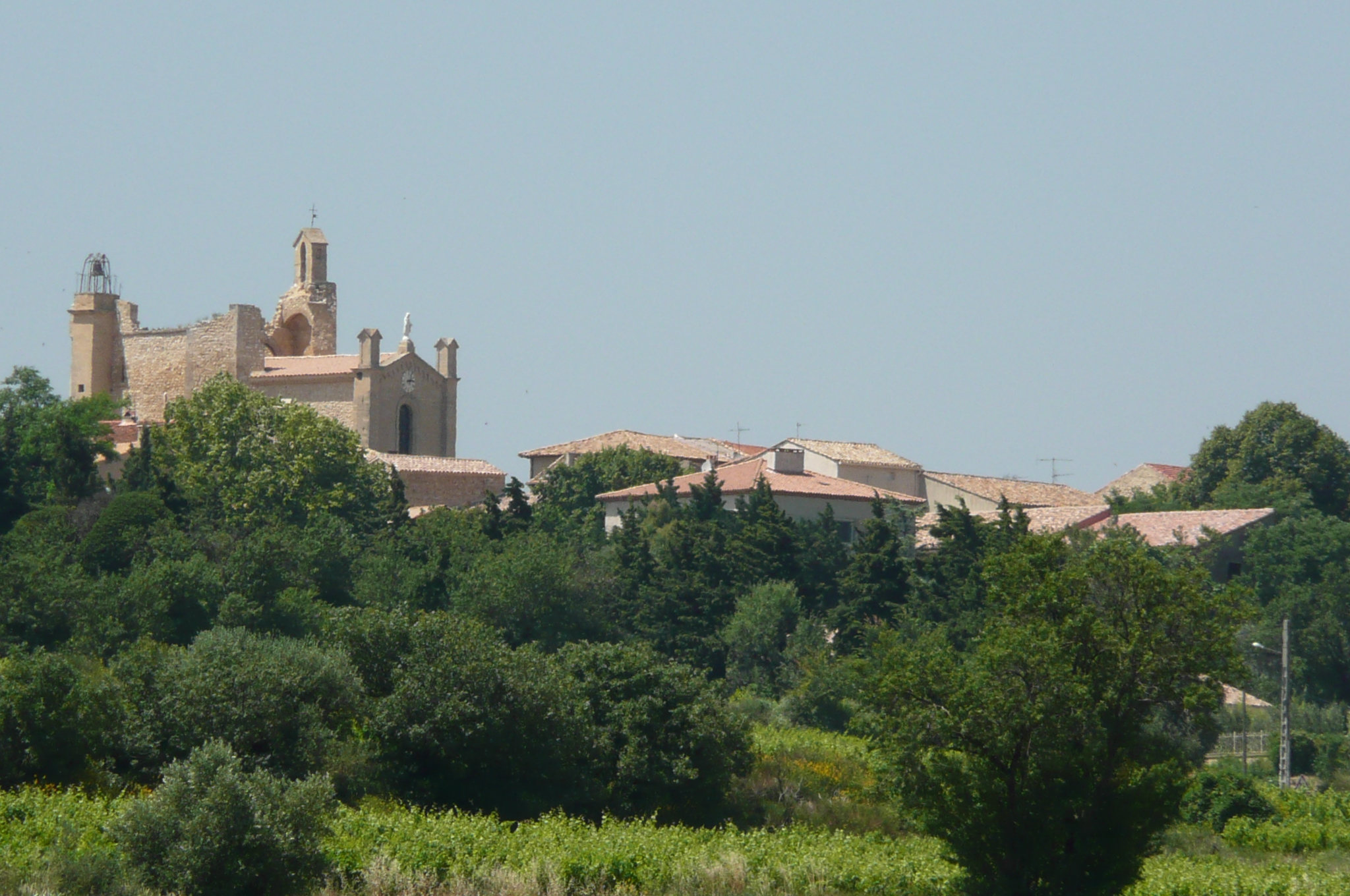 Estézargues.